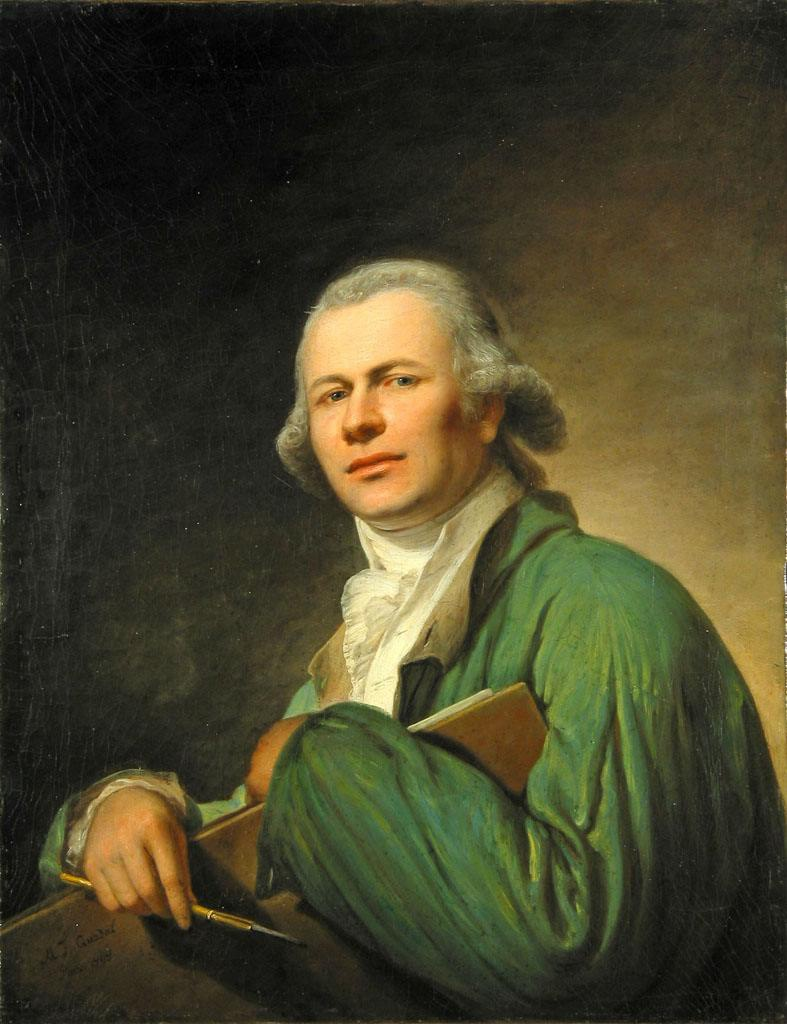 Self-portrait